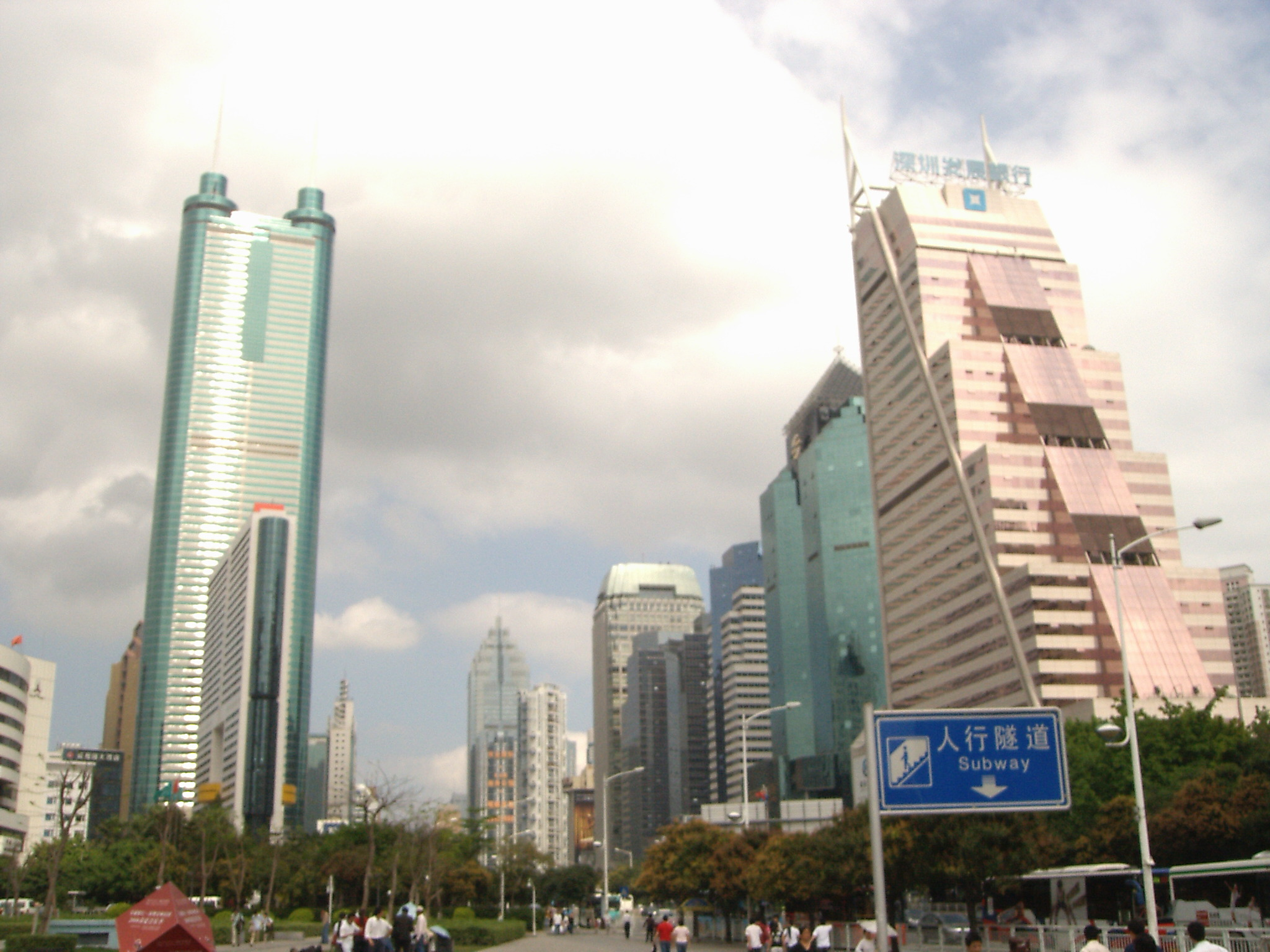 中文（中国大陆）: 深圳地王大厦和深发展大楼